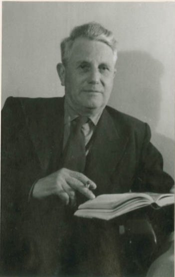 han krug